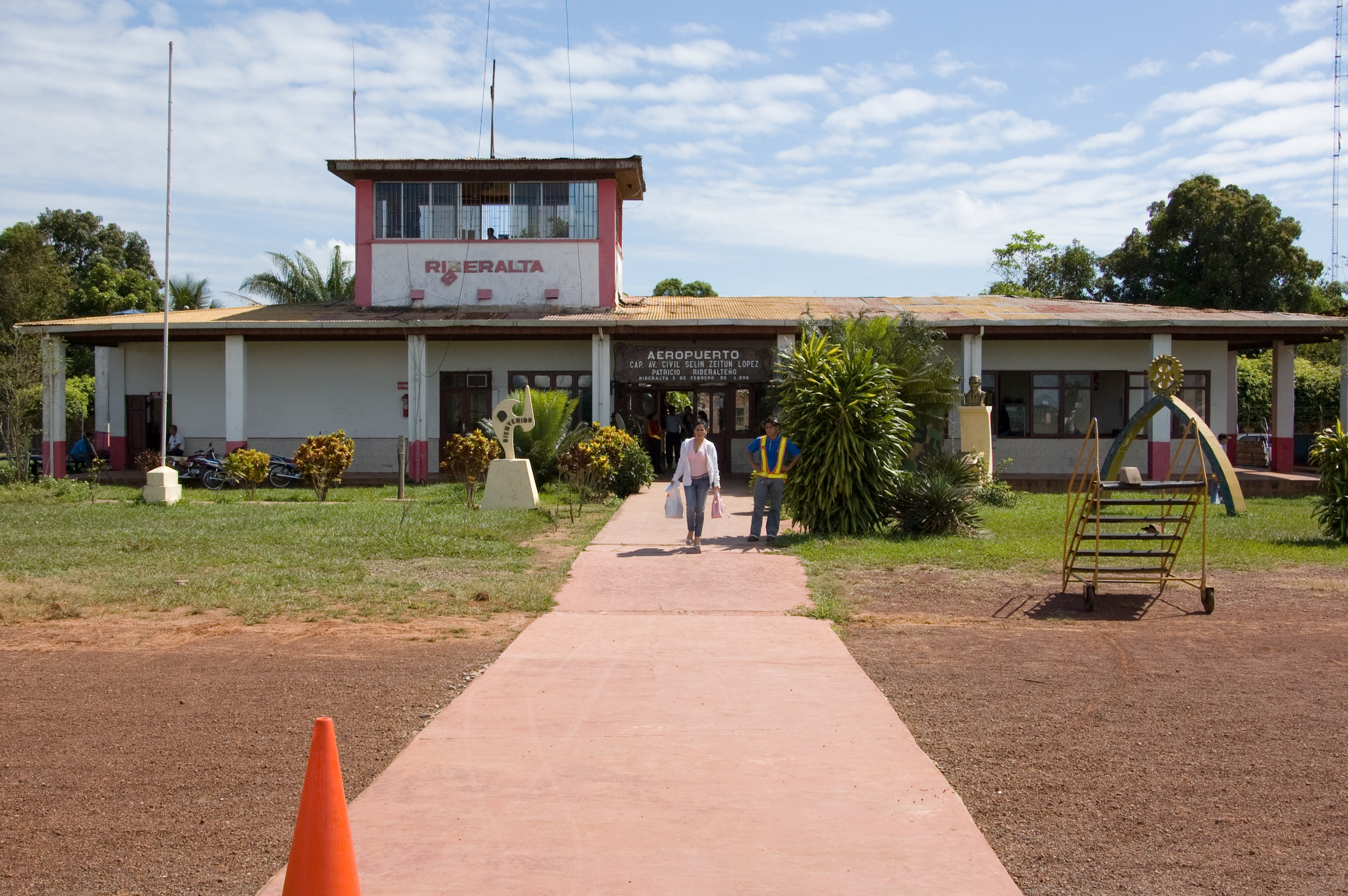 Flughafen Riberalta, Beni, Bolivien IATA: RIB, ICAO: SLRI